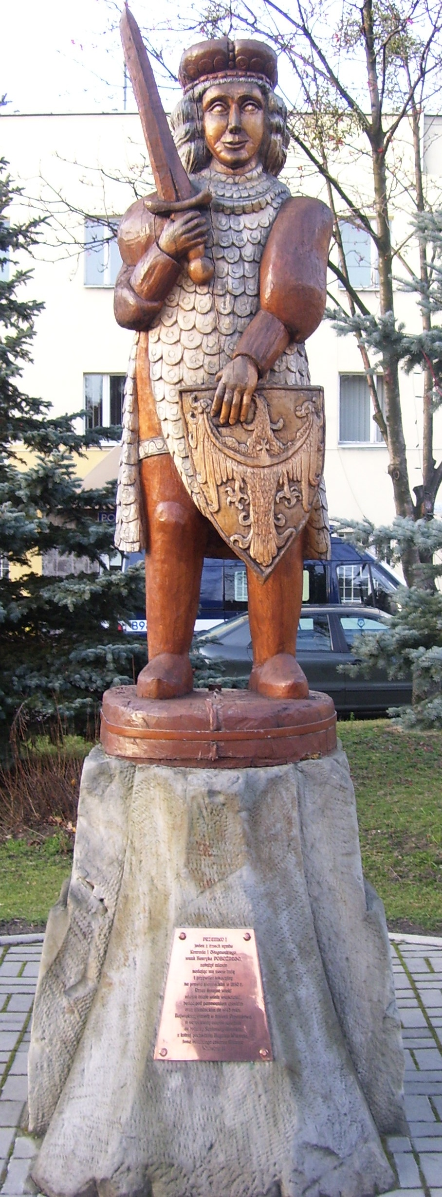 Przemków, pomnik Przemka Ścinawskiego.